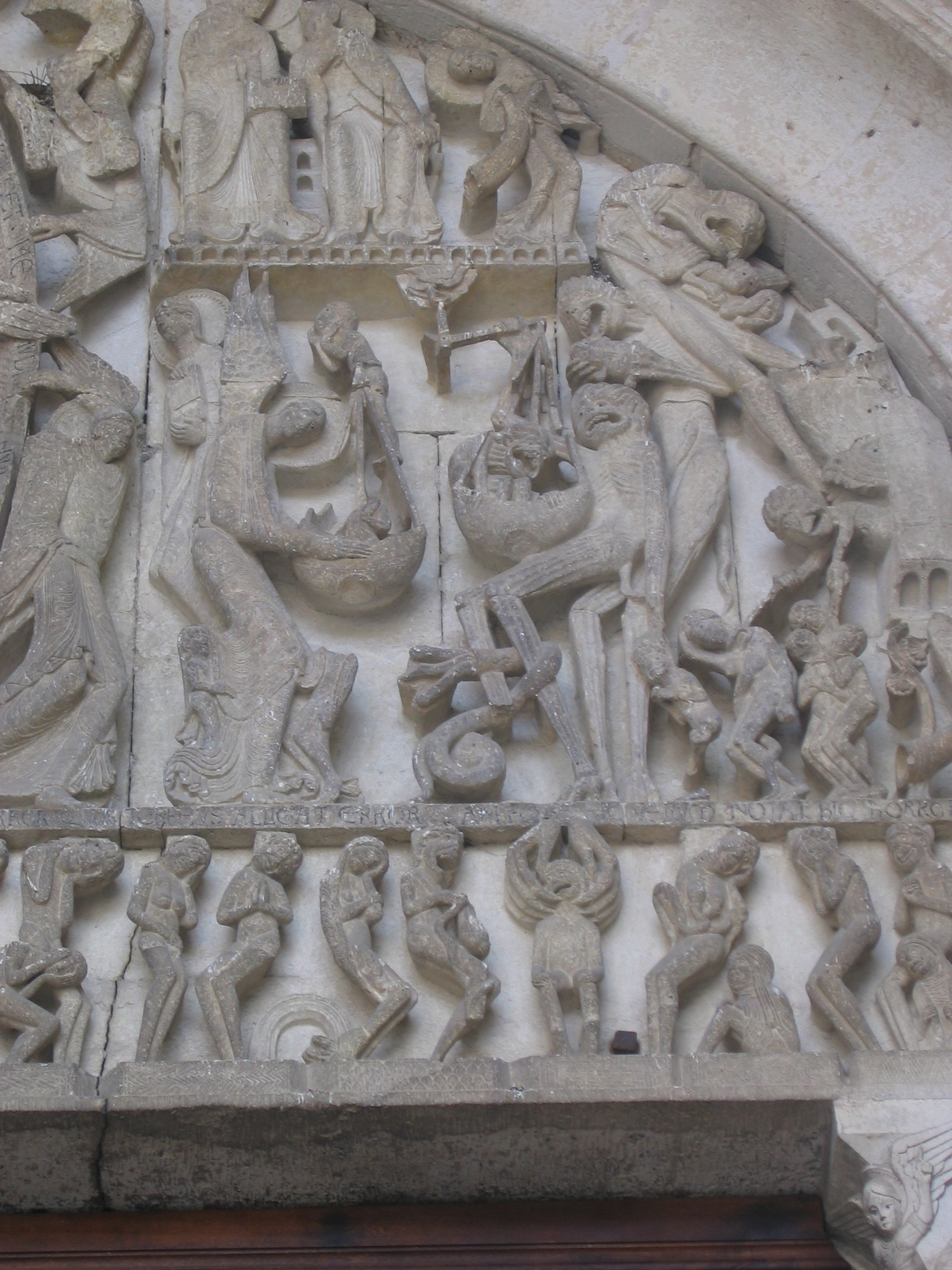 Tympan de la cathédrale d'Autun, France. Détail : la pesée des âmes